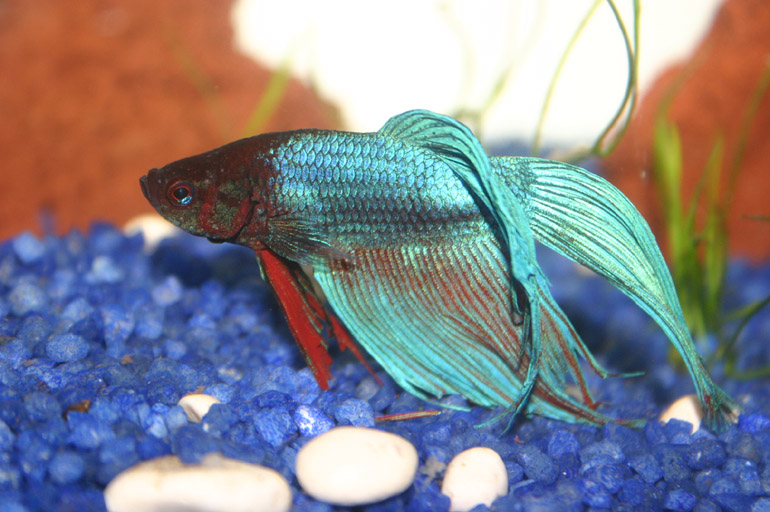 Autore: ..::Marrabbio2::.. Descrizione: Maschio di Betta splendens Licenza d'uso: GFDL